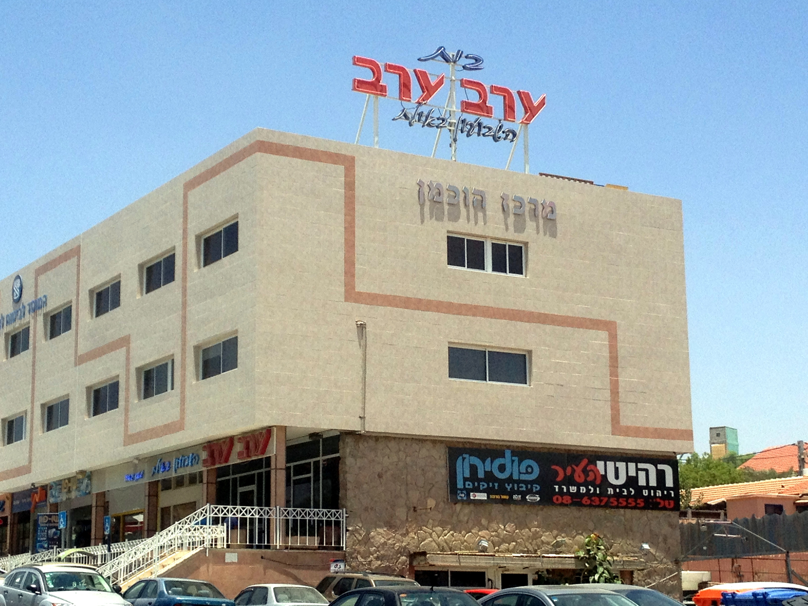 בית ערב ערב באילת